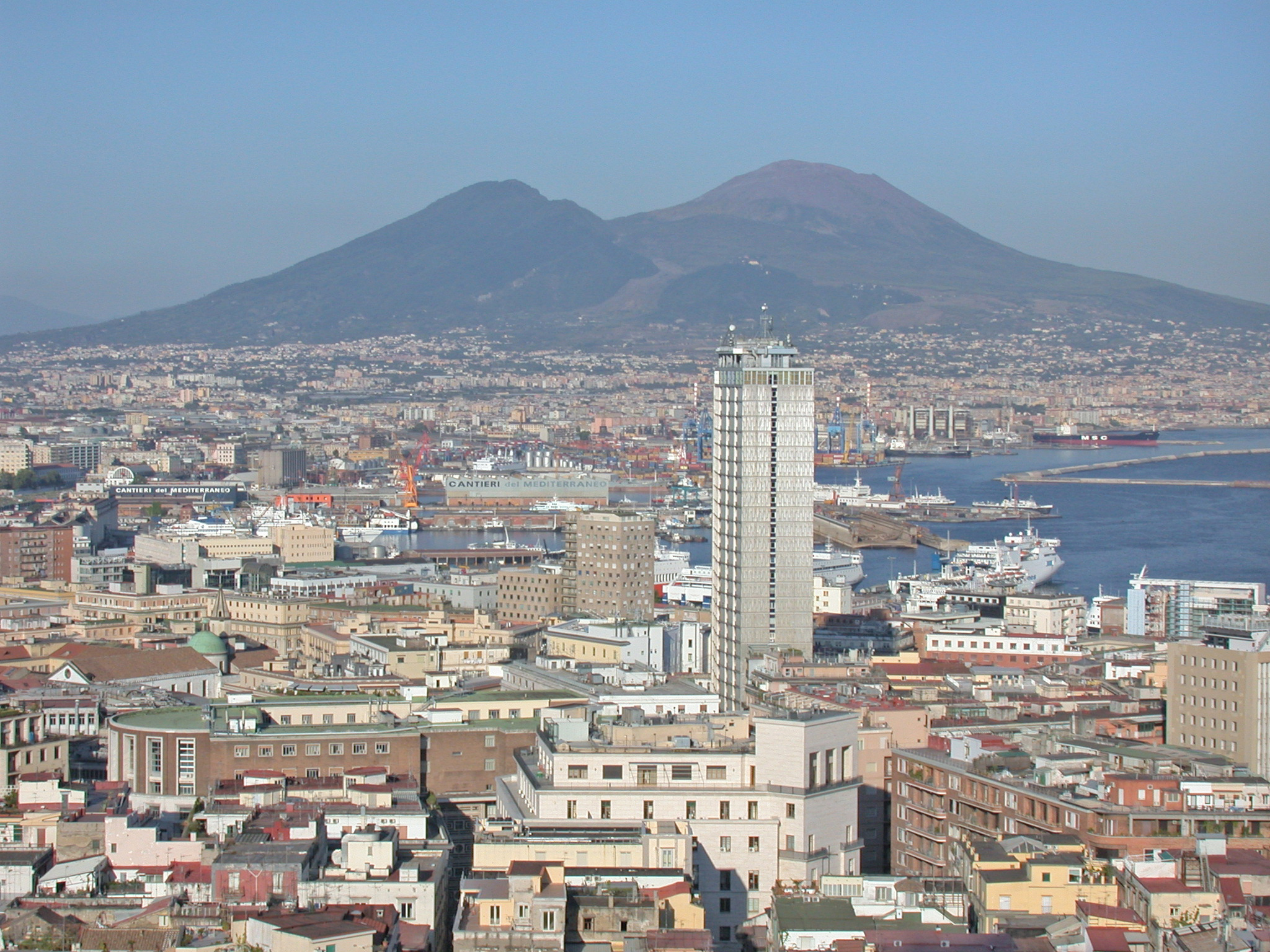 Italia, regione Campania, Napoli, panorama del centro storico, con lo sfondo del Vesuvio, da presso la certosa di San Martino